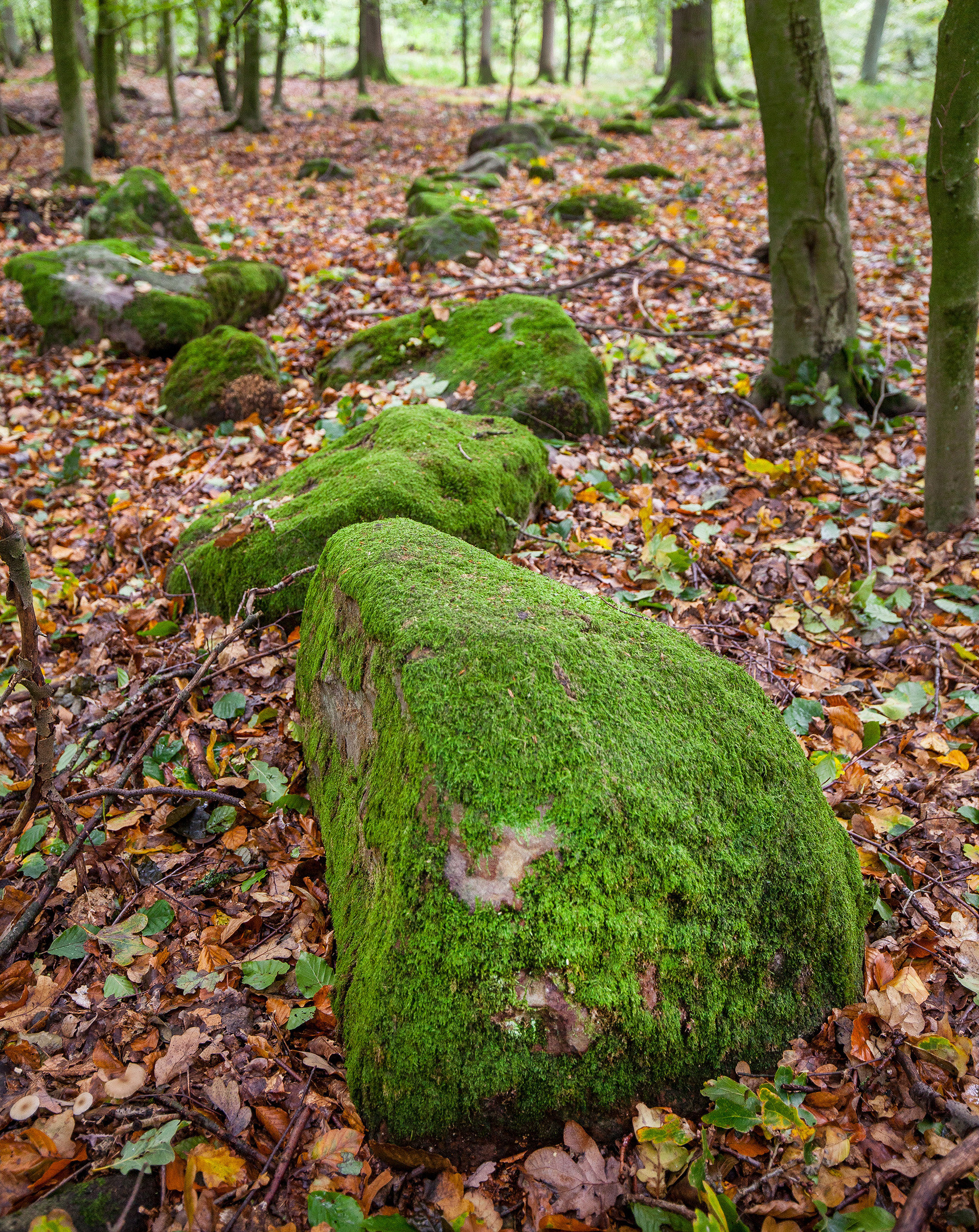 Teilansicht einer hufeisenförmigen Steinsetzung (Bodendenkmal) im Leistruper Wald, Detmold-Diestelbruch, Kreis Lippe, Nordrhein-Westfalen.